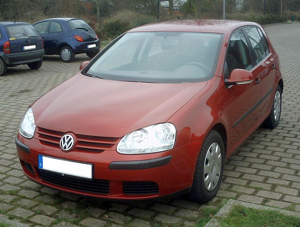 VW Golf